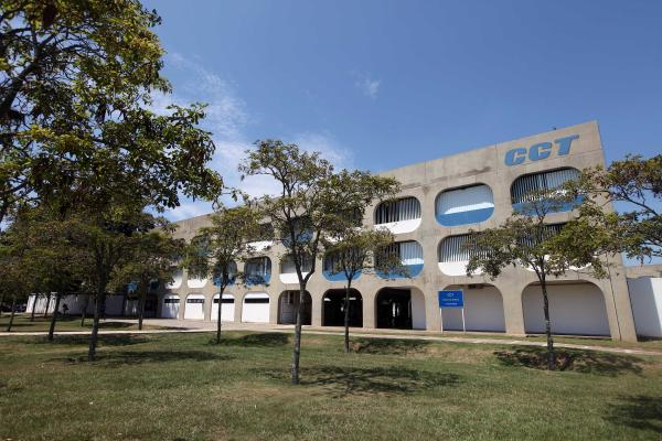 Centro de Ciência e Tecnologia (CCT) da Universidade Estadual do Norte Fluminense Darcy Ribeiro (UENF) em Campos dos Goytacazes, Rio de Janeiro.